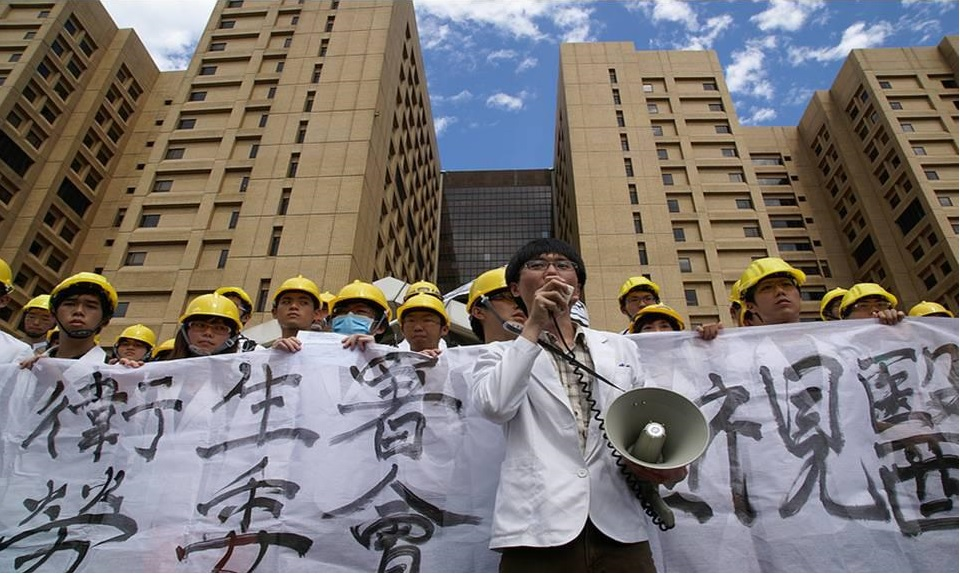 五一勞動節，醫師勞動條件改革小組於臺大醫院東址前抗議。